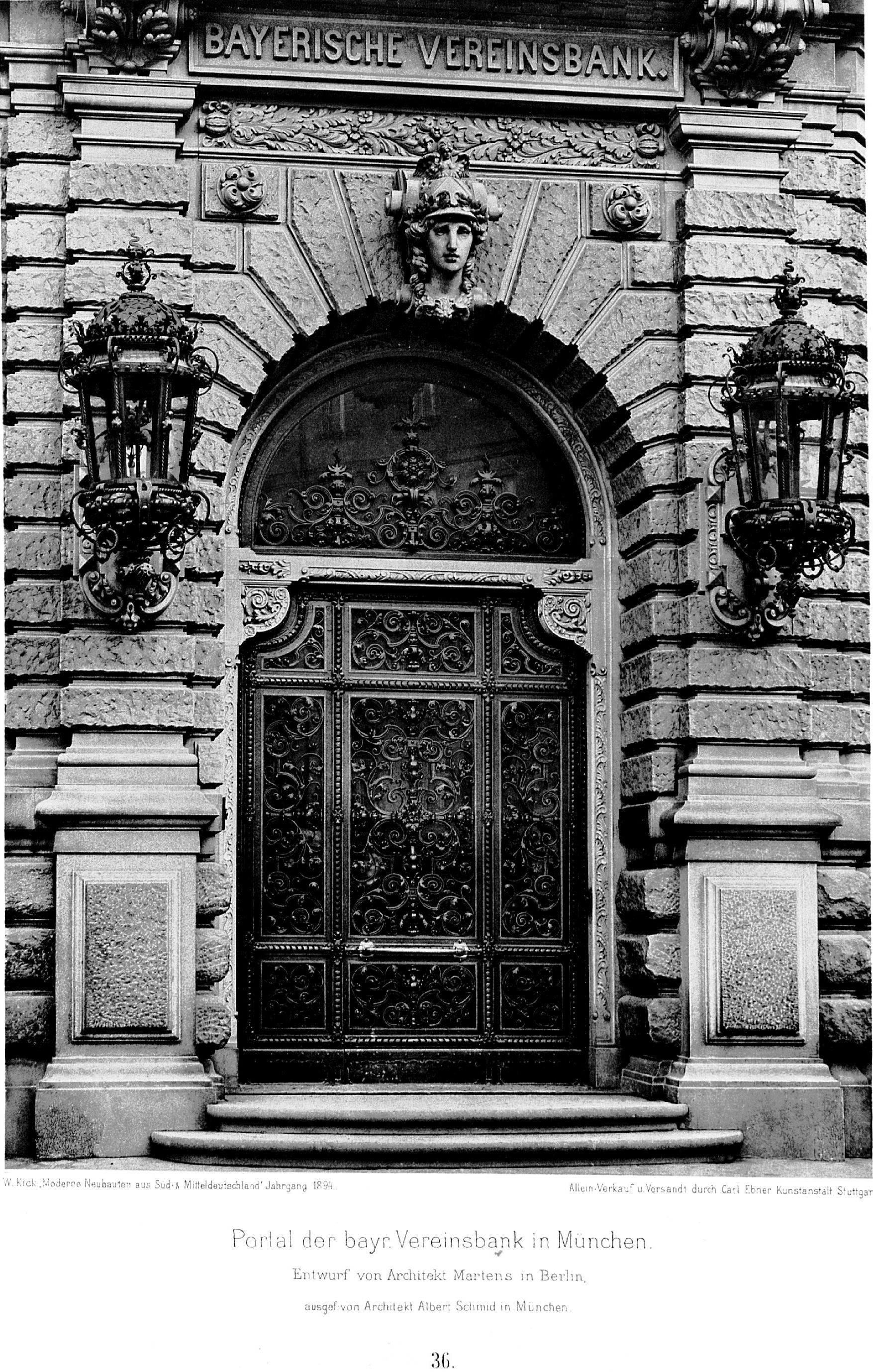 Bayrische Vereinsbank in München, Portal, Entwurf von Architekt Martens in Berlin, ausgeführt von Architekt Albert Schmid aus München, Tafel 36, Kick Jahrgang I